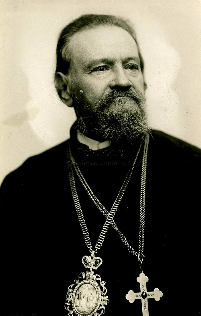 Nicolae Ivan